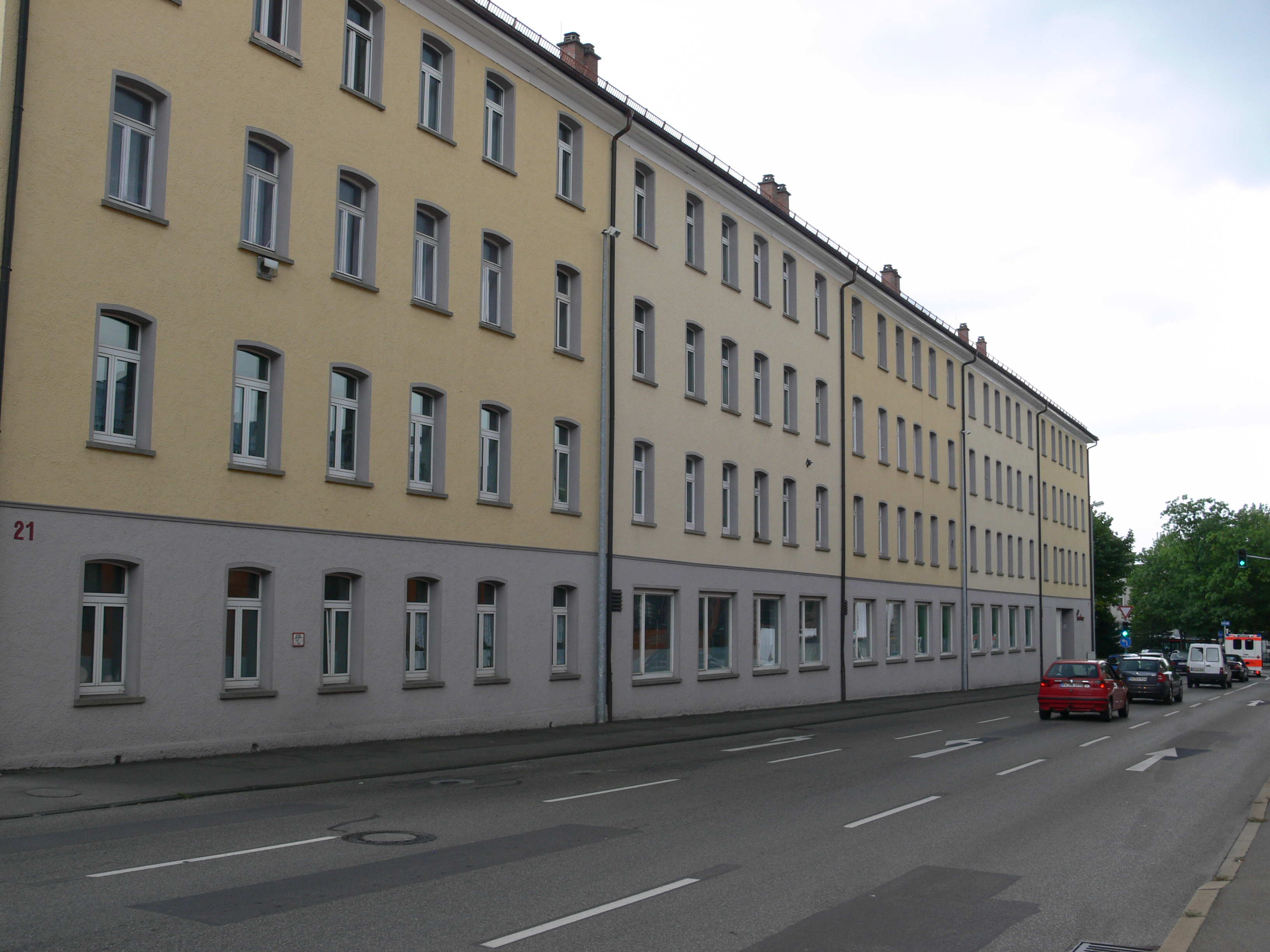 Ravensburg Gebäude der Maschinenfabrik Ravensburg in der westlichen Schussenstraße, mit Oberleitungsrosetten der ehem. Straßenbahn Ravensburg-Weingarten-Baienfurt